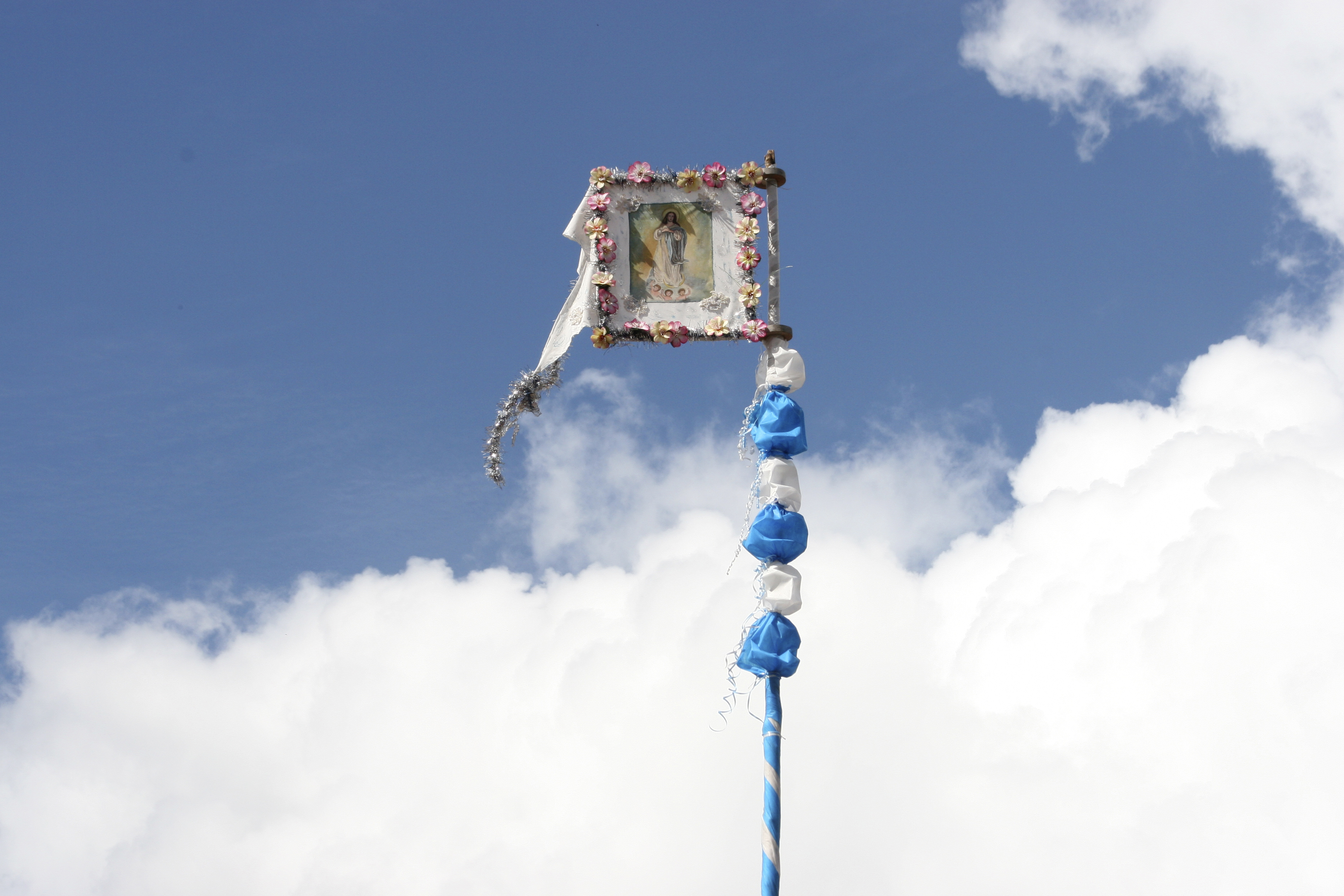 Túmulo de Santa Dica - Benedicta Cypriano Gomes